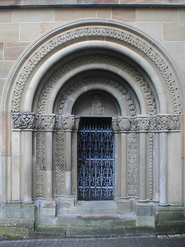 Portal der Walterichkapelle in Murrhardt